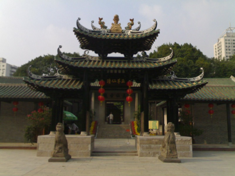 位于广州市的五仙观